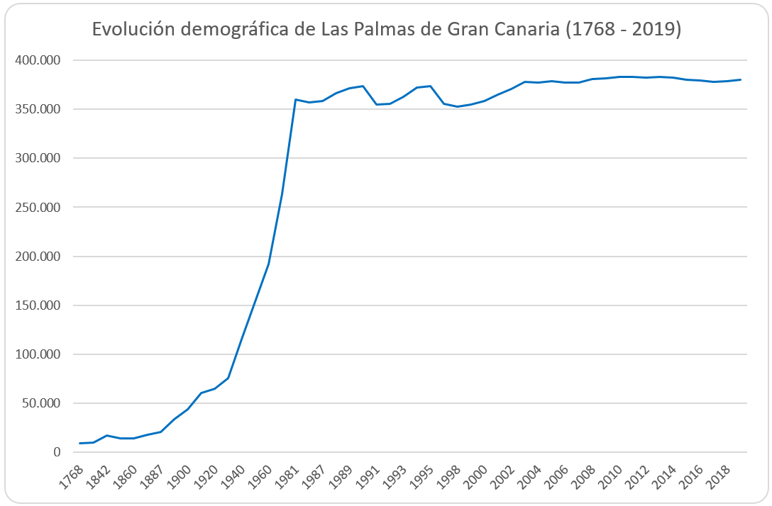 Evolución demográfica de Las Palmas de Gran Canaria (1768 - 2019)